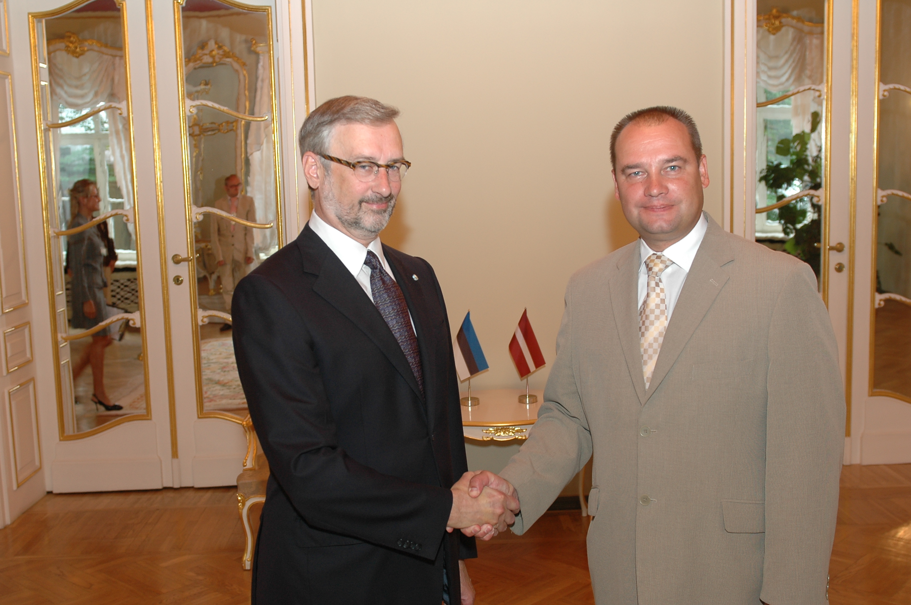 2010.gada 26.jūlijs. Saeimas priekšsēdētājs Gundars Daudze tiekas ar Igaunijas Republikas ārkārtējo un pilnvaroto vēstnieku Latvijas Republikā Jāku Jeerītu (Jaak Jõerüüt). Foto: Saeima